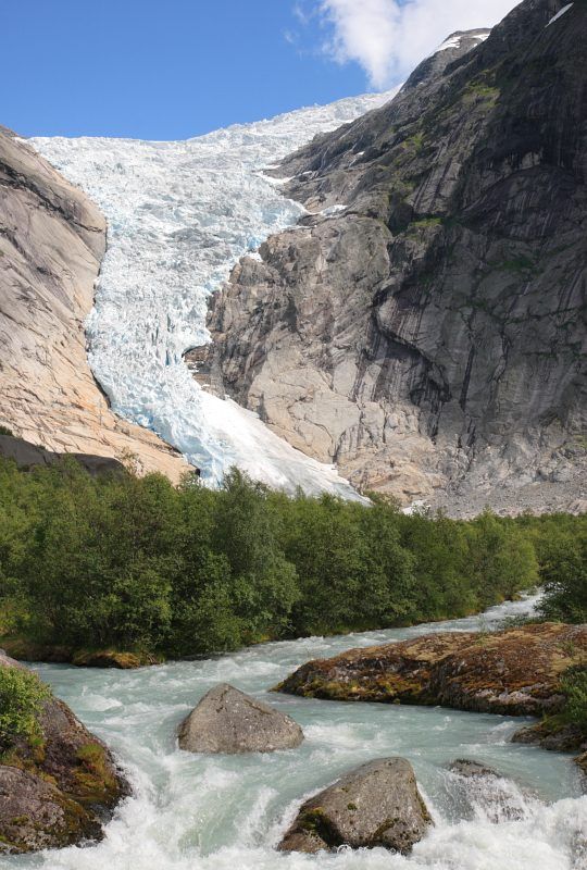 Briksdalsbreen, part of the Jostedalsbreen glacier.